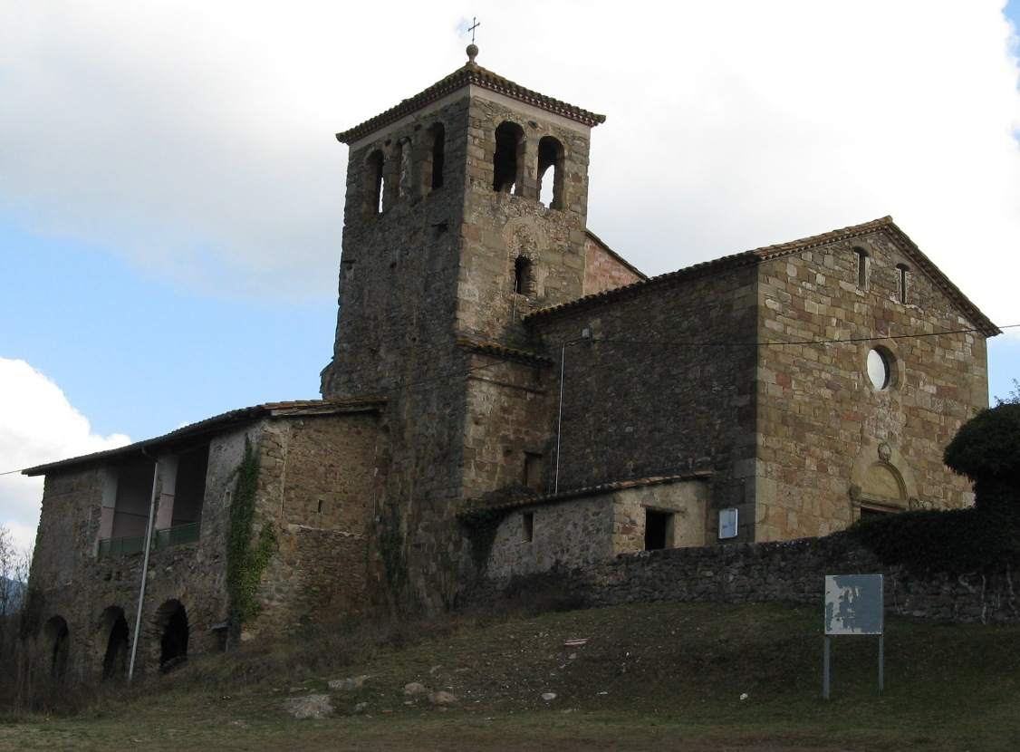 Roman Church: Sant Pere Despuig (Val de Bianya (near Olot), Catalunya, Spain)